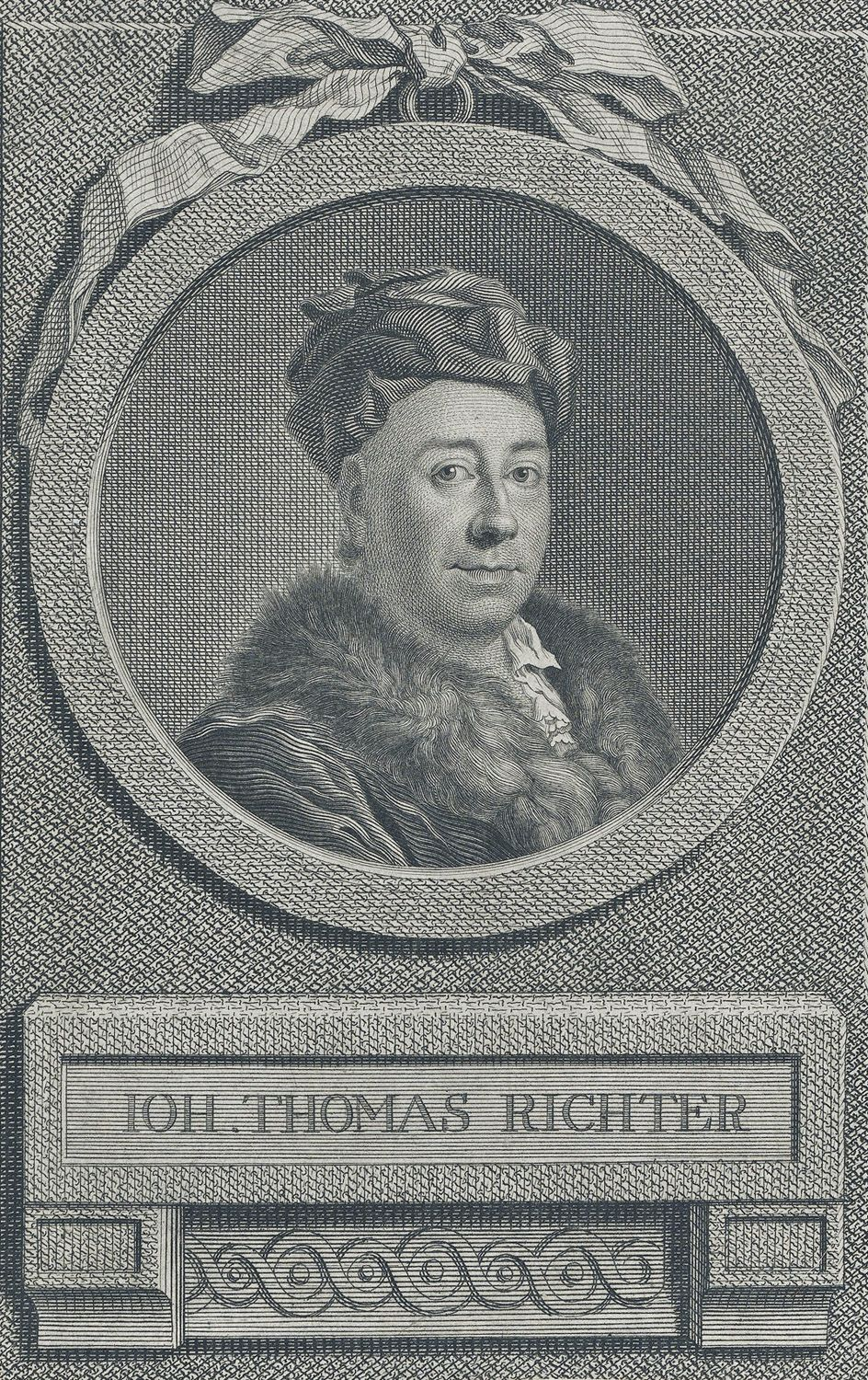 Porträt-Kupferstich des Leipziger Bankiers Johann Thomas Richter